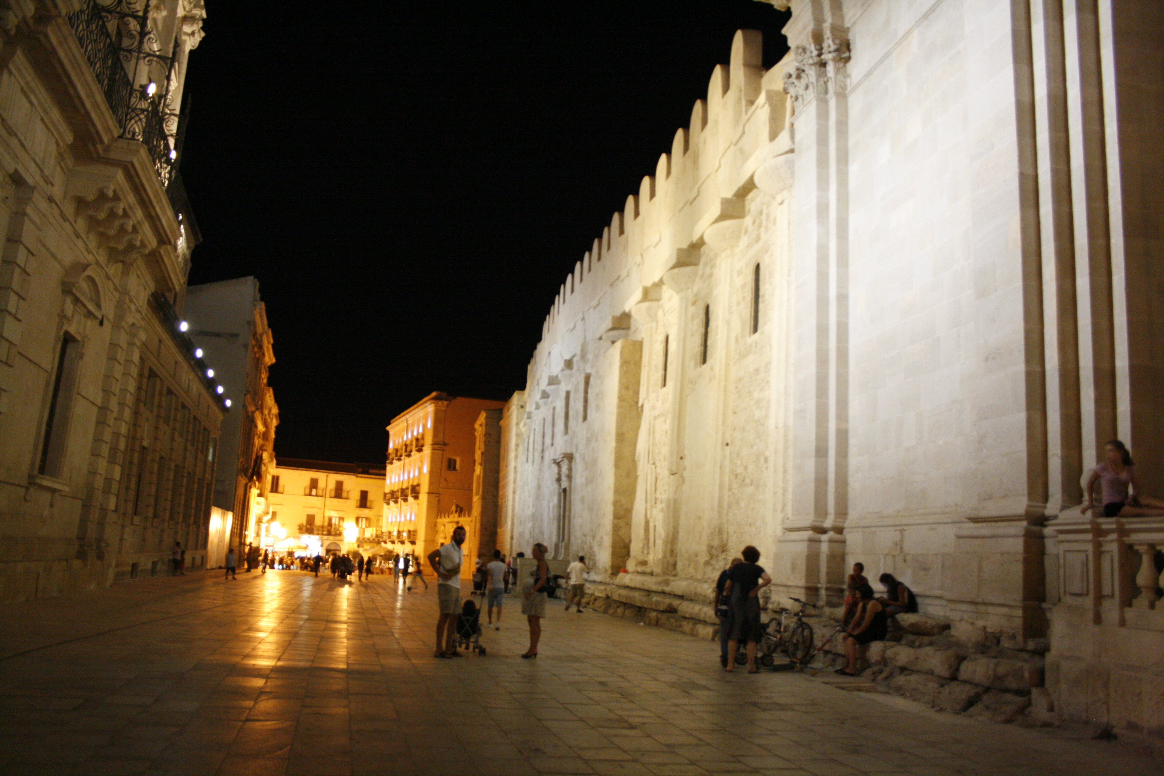 Tempio Artemide - Tempio Athena, piazza duomo SR (Sicilia)